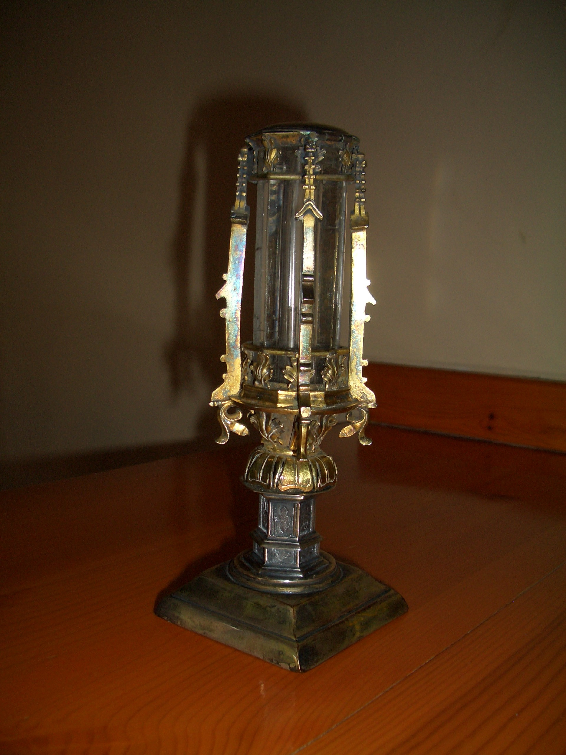 Fotografia actual del reliquiari de la Santa Espina. Valls conserva una Espina Santa es a dir, una de les espines de la corona de la passió de Jesucrist. Era un record familiar del pare del rei de Xipre, Pere de Lusignan, casat amb Elionor. El 1948 es va inaugurar el nou convent i capella de les Carmelites construït damunt de les runes de l’antic edifici. L’Espina Santa es guarda dintre d’un estoig de vidre amb forma de tub inserit en un reliquiari de plata.